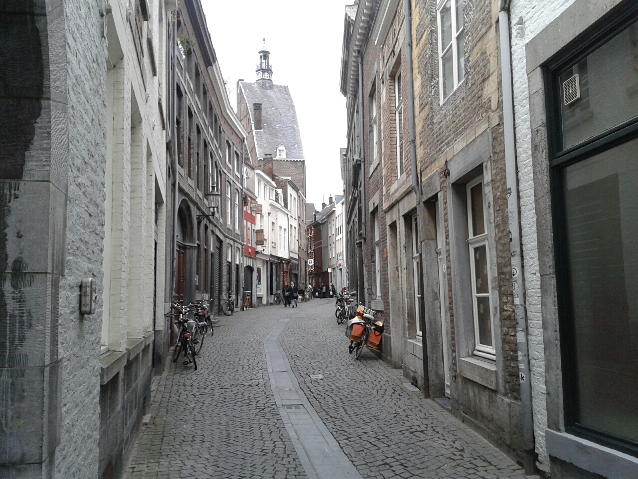 רחוב היהודים במאסטריכט הולנד